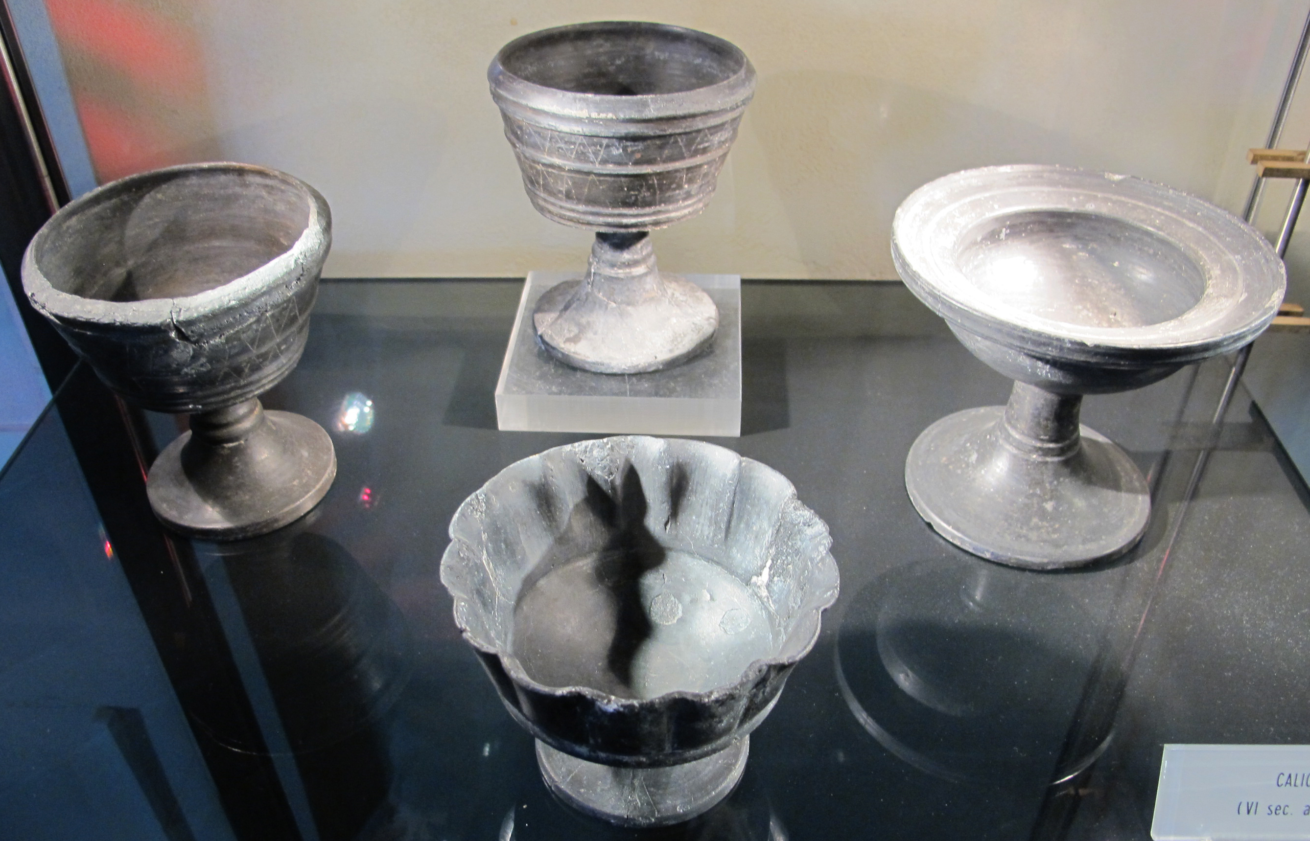 Museo Archeologico Nazionale G.C.Mecenate - MIBAC This is a photo of a monument which is part of cultural heritage of Italy.